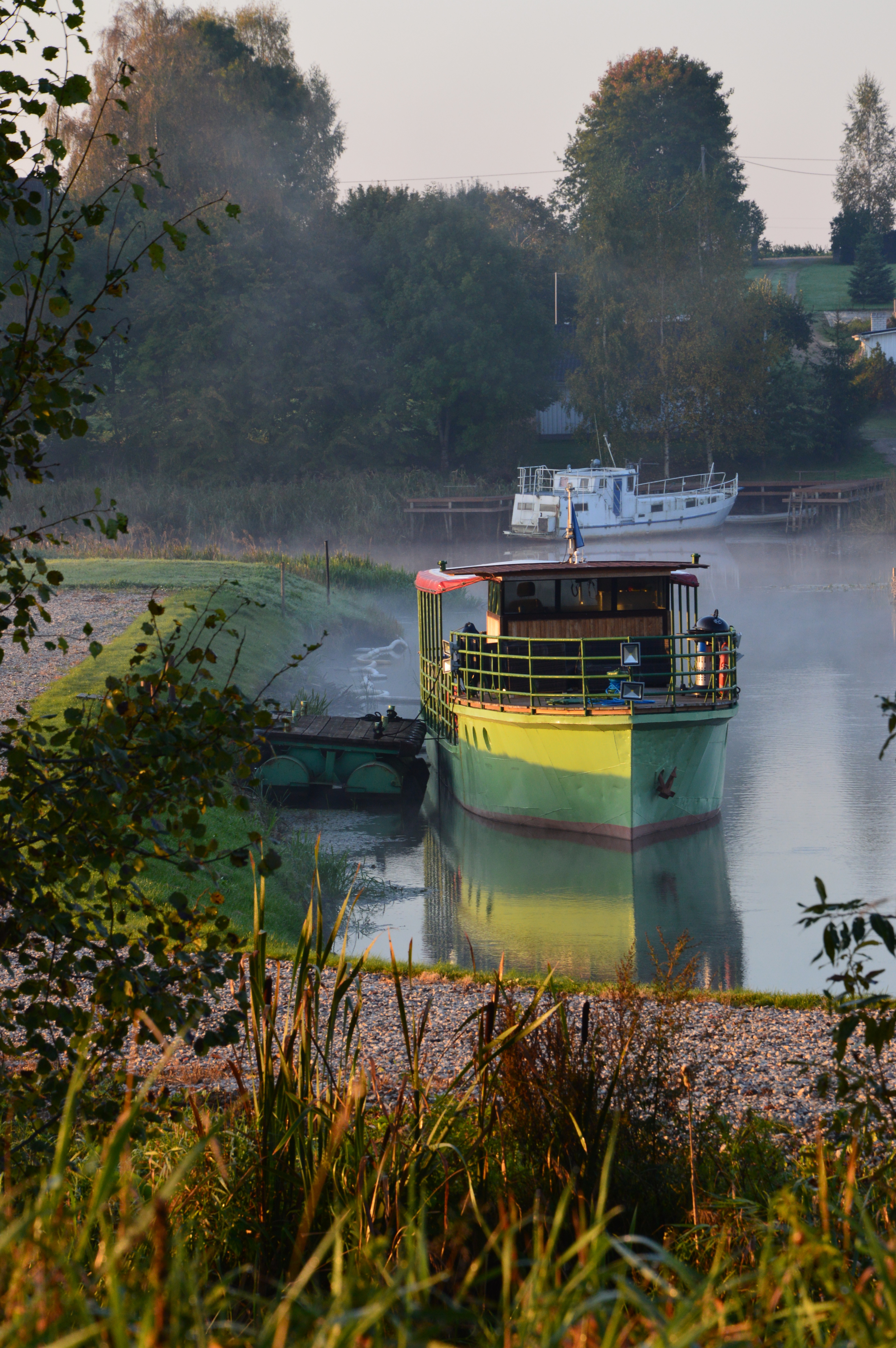 Paat Emajõe ääres. Kavastu.